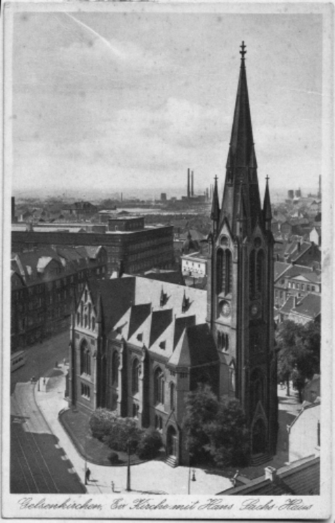 Gelsenkirchen, evangelische Altstadtkirche, neugotischer Bau von 1884, Aufnahme um 1930, 1944 kriegszerstört; im Hintergrund das Hans-Sachs-Haus